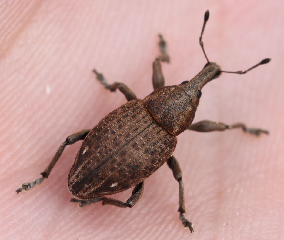 Lepyrus capucinus am 26. April 2018 in Walldorf/Baden